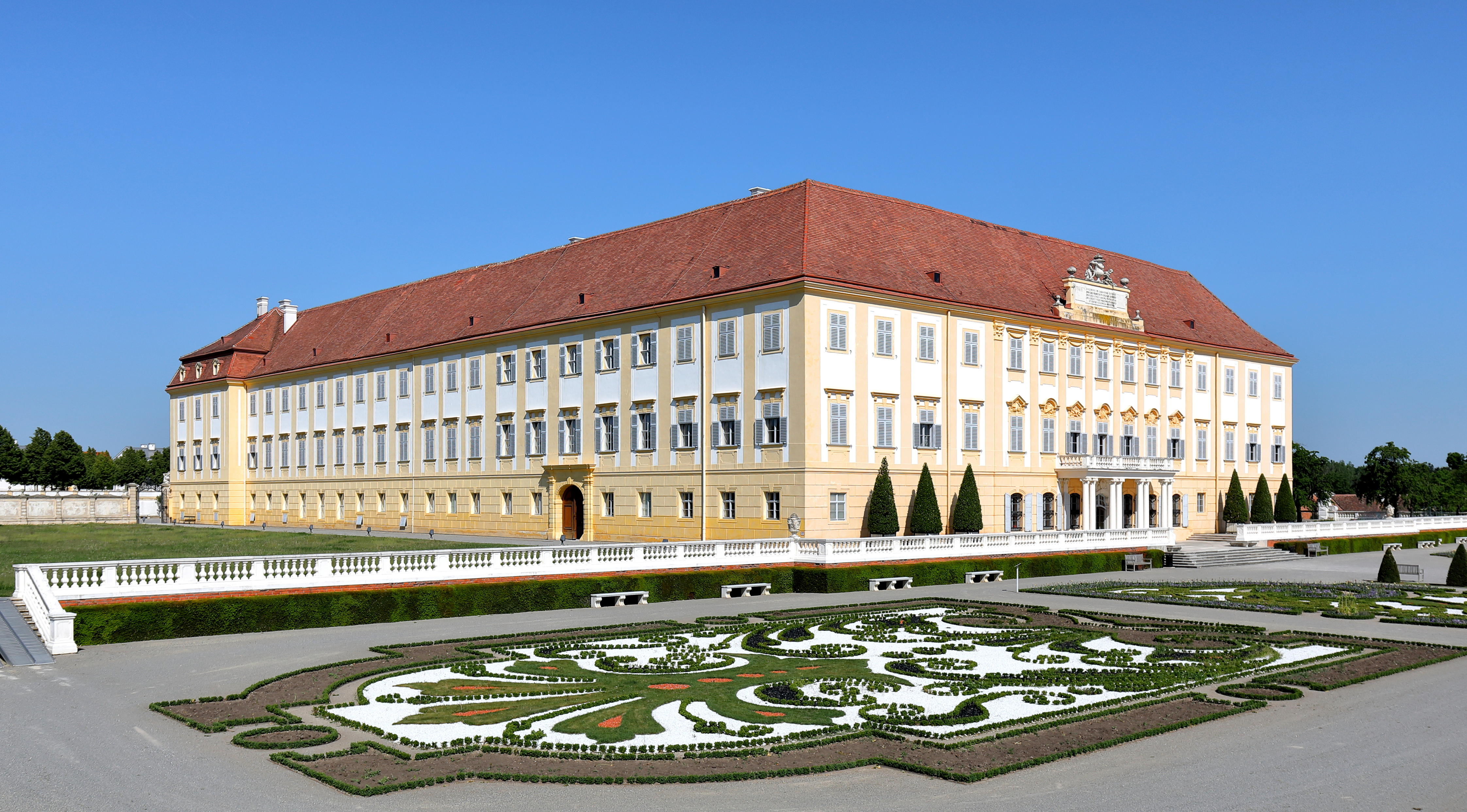 Südostansicht des Hauptgebäudes der Schlossanlage Schloss Hof in der niederösterreichischen Marktgemeinde Engelhartstetten. Die Schlossanlage wurde um 1627 auf einer Geländekante und östlich der mittelalterlichen Feste Hof errichtet. Nachdem 1725 Prinz Eugen die Anlage erworben hatte, baute er diese zu einem repräsentativen Landsitz aus. 1755 kam das Schloss in den Besitz von Maria Theresia. Von 1773 bis 1775 erfolgte dann ein Um- und Ausbau zum heutigen Erscheinungsbild durch Franz Anton Hillebrandt.